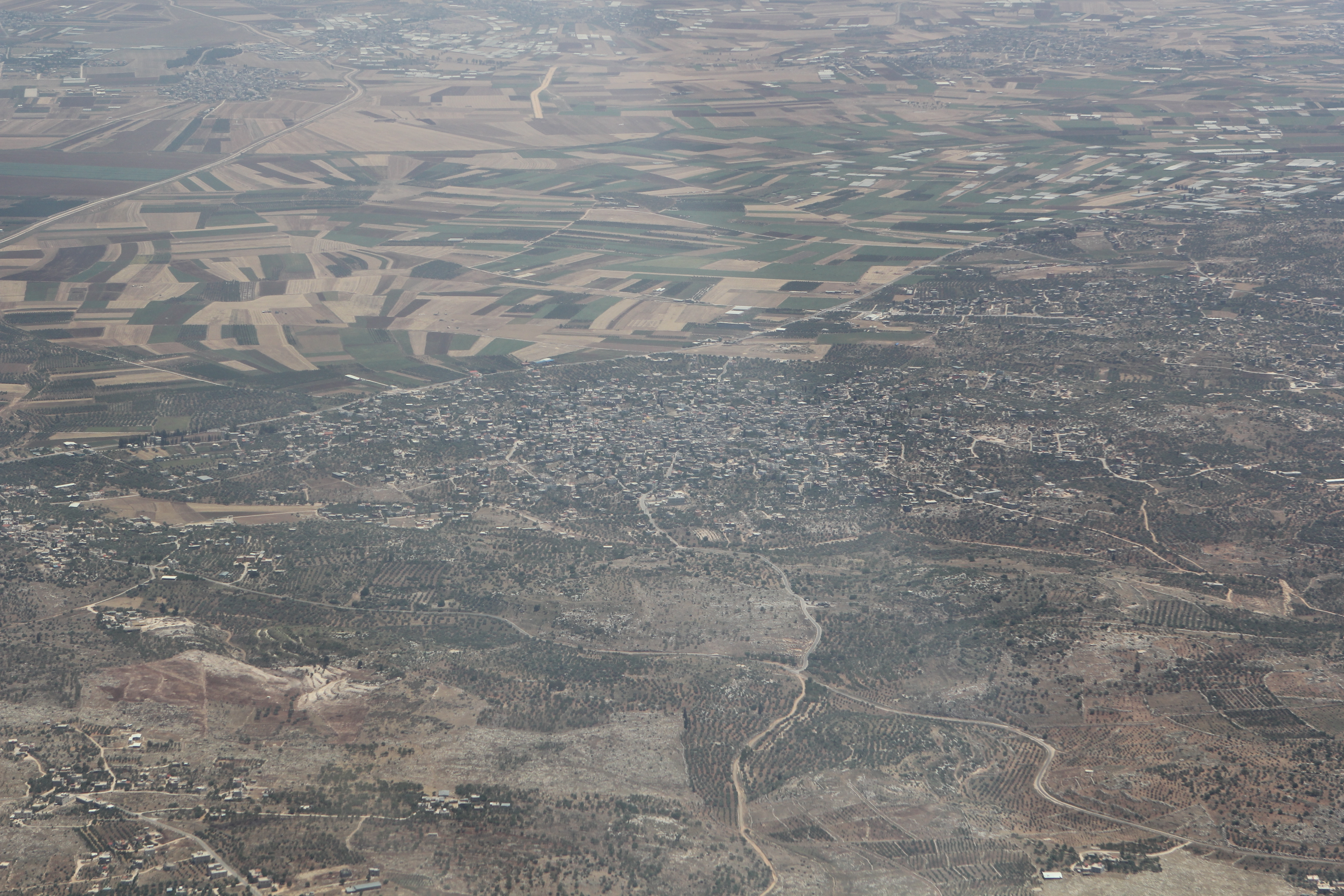 צילום אוויר של סילת אל-ח'רית'יה